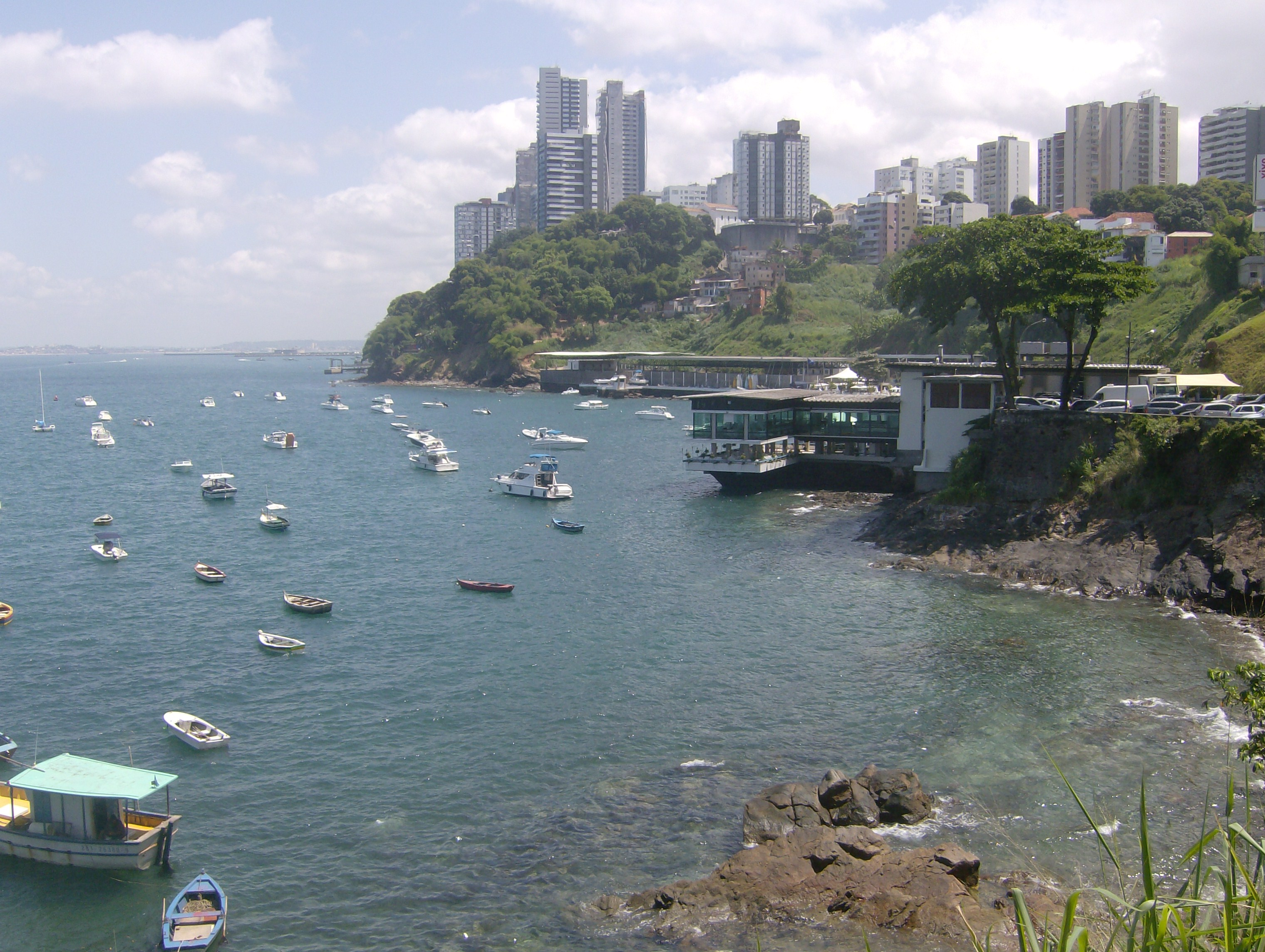 O Yacht Club da Bahia em Salvador, Bahia, Brasil.